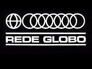 Terceiro logotipo da Rede Globo, de 1969 a 1976.